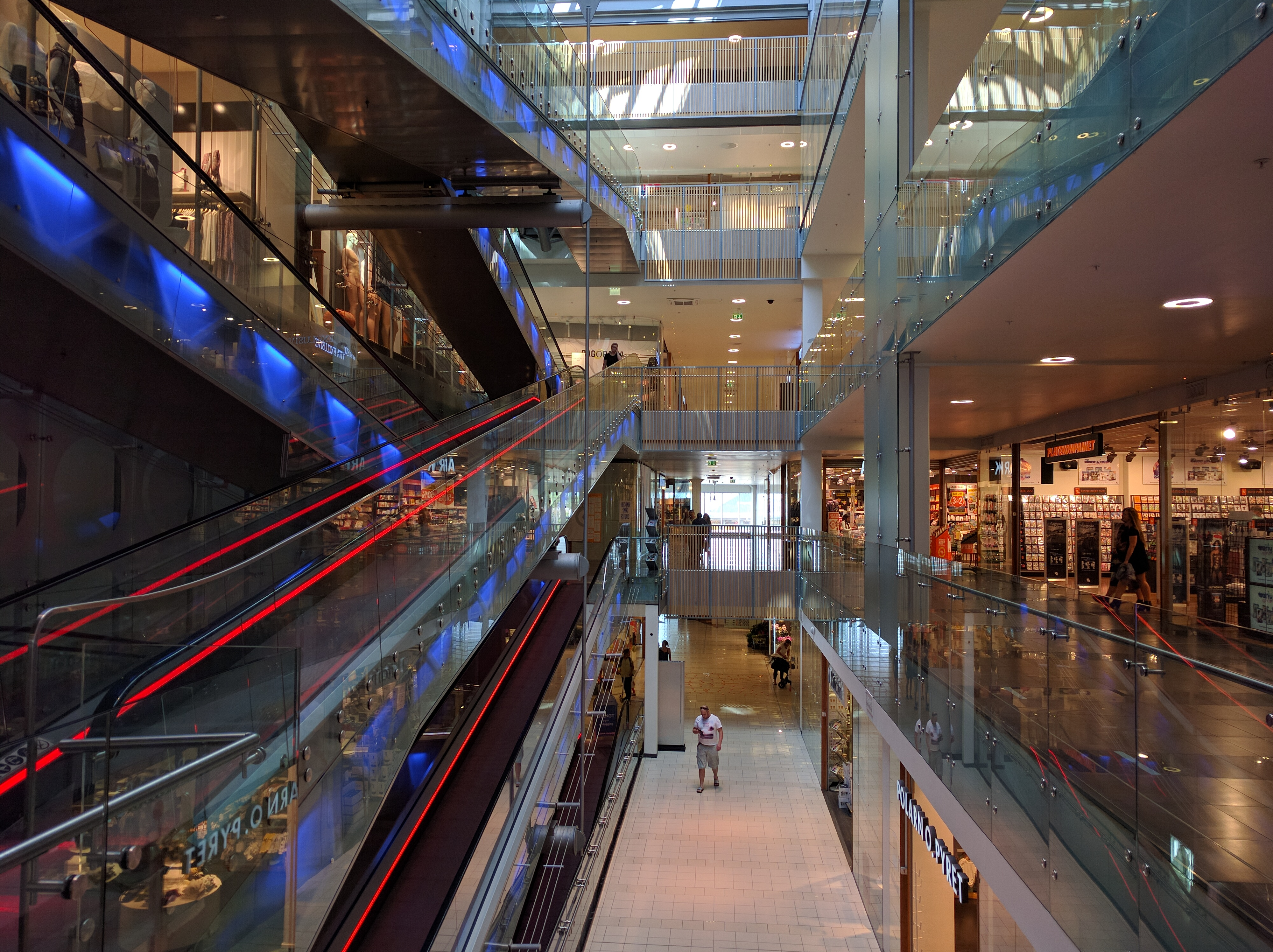 Nyeste delen av storsenteret